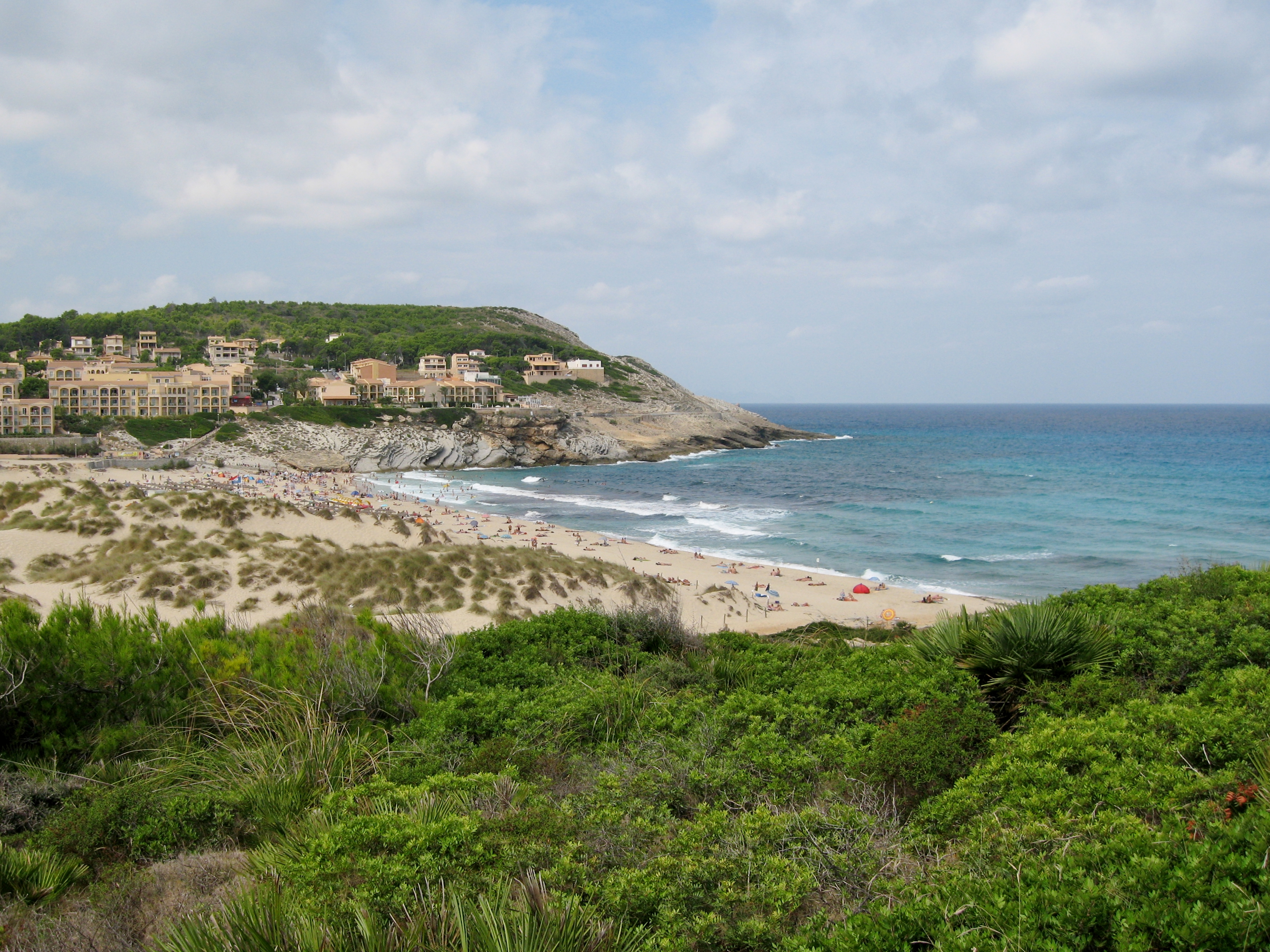 Cala Mesquida, Gemeinde Capdepera, Mallorca, Spanien